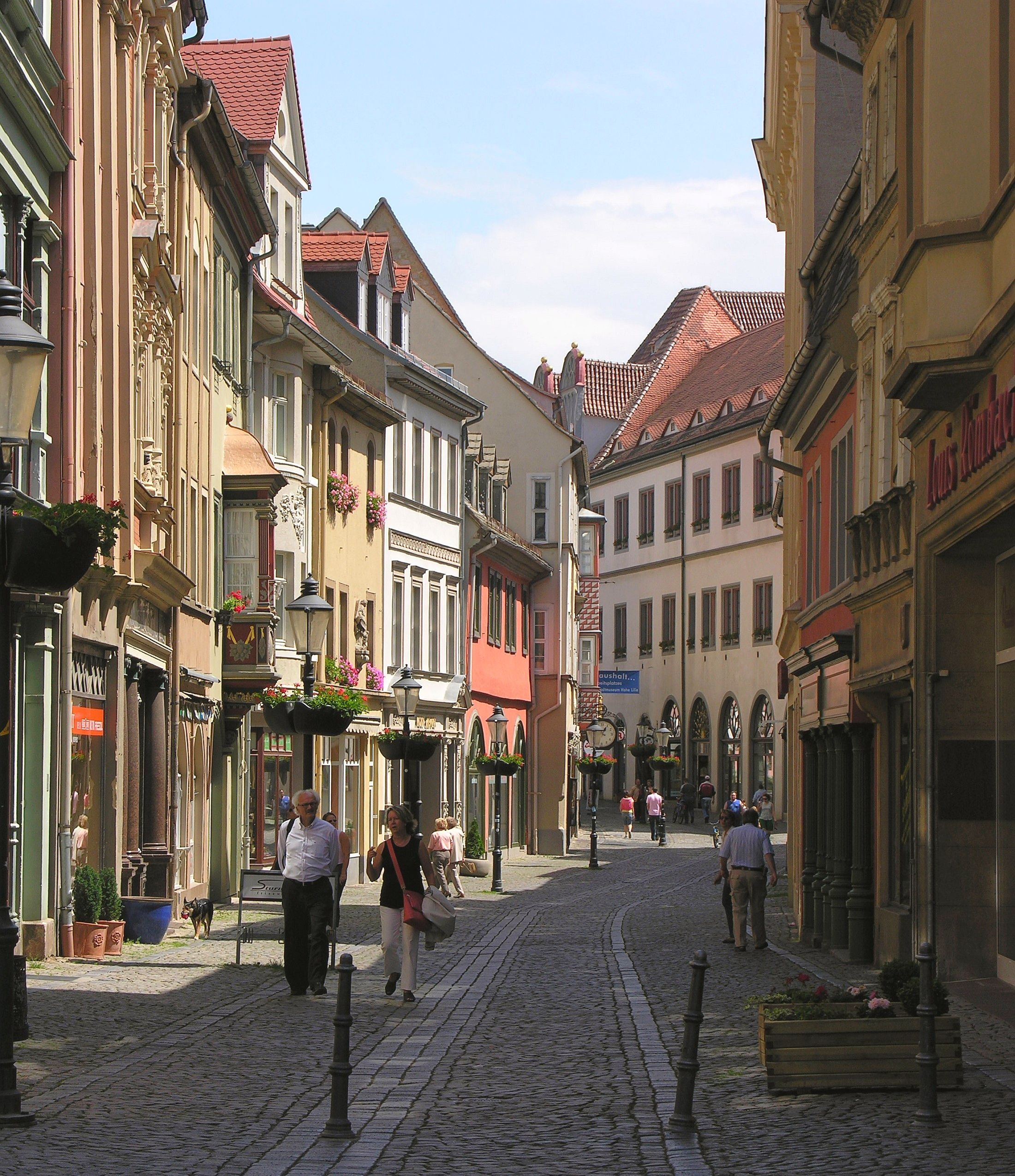 Naumburg Fußgängerzone historische Altstadt Foto Wolfgang Pehlemann Wiesbaden DSCN2538